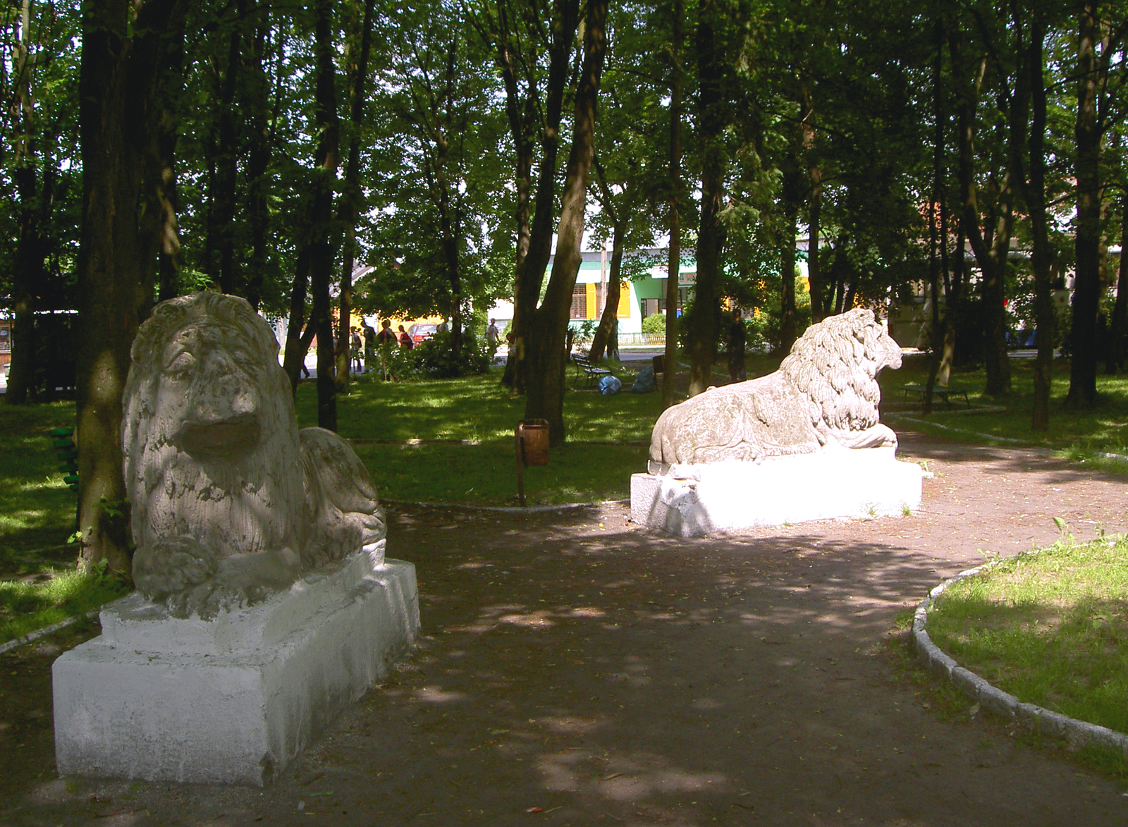 Horodło, Poland • Lwy w rynku / Lions in town square